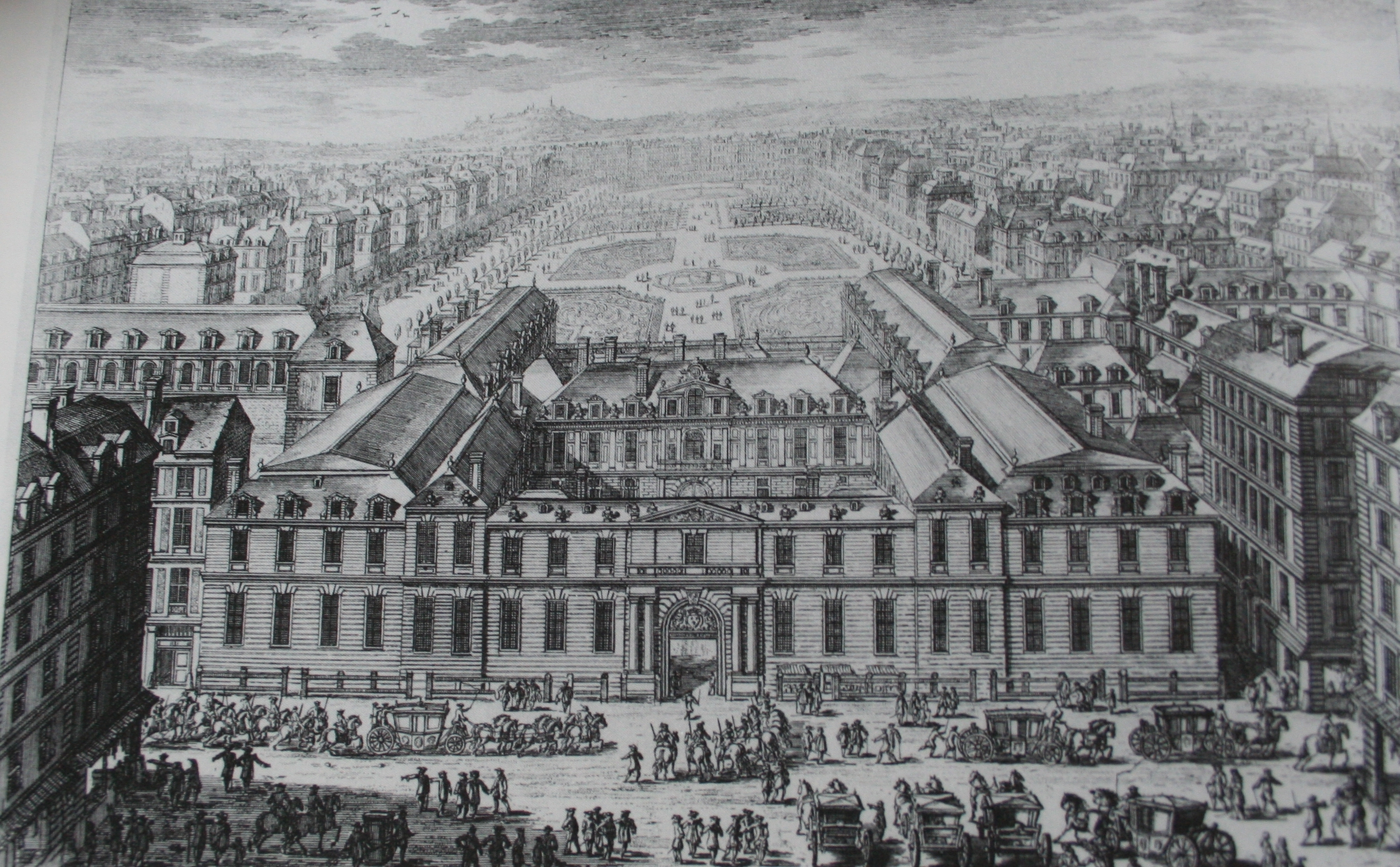 Vue du Palais-Royal vers 1679. Gravure anonyme. Musée Carnavalet. Paris.